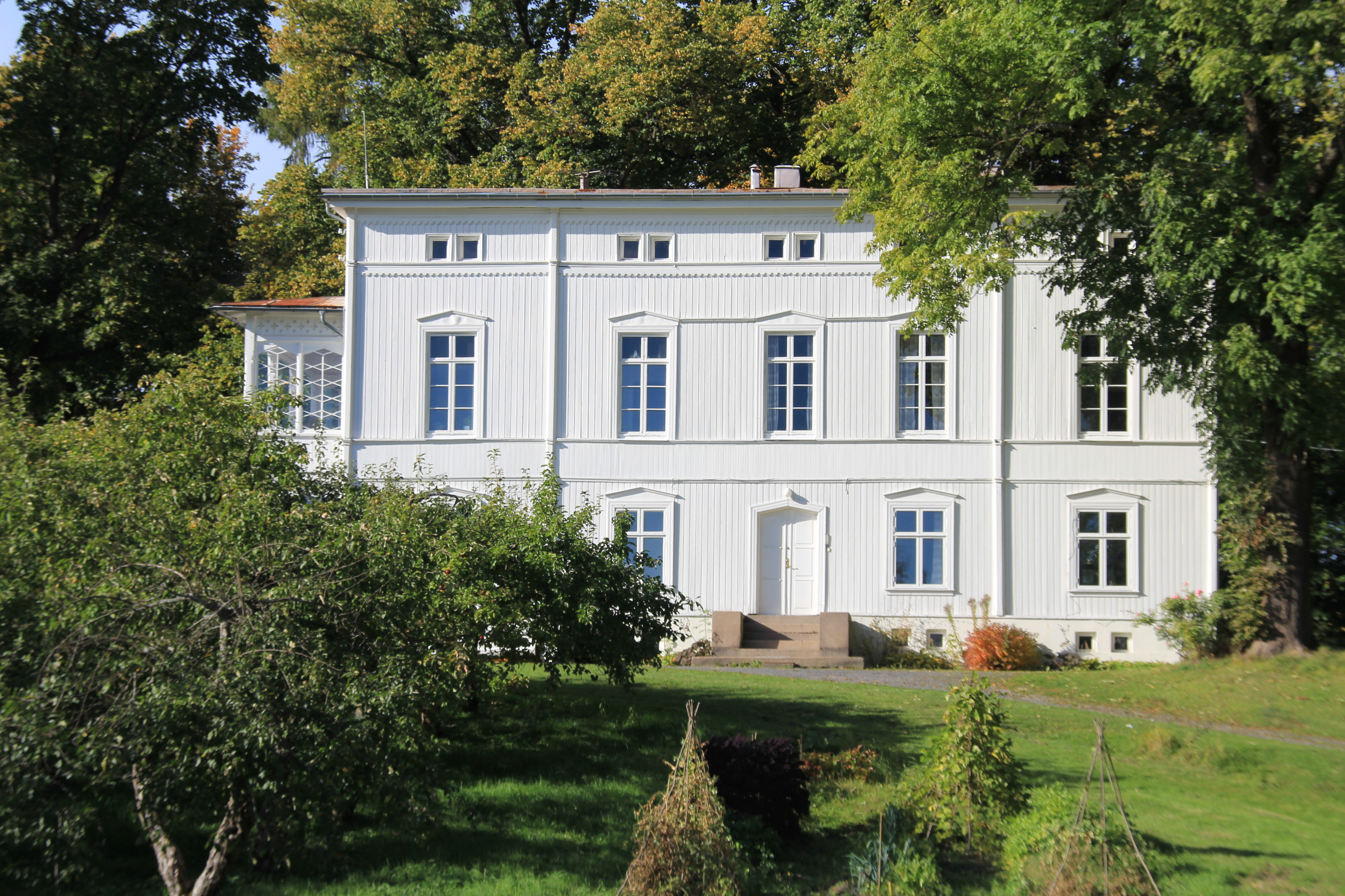 Strømsborg, Bygdøy kongsgård